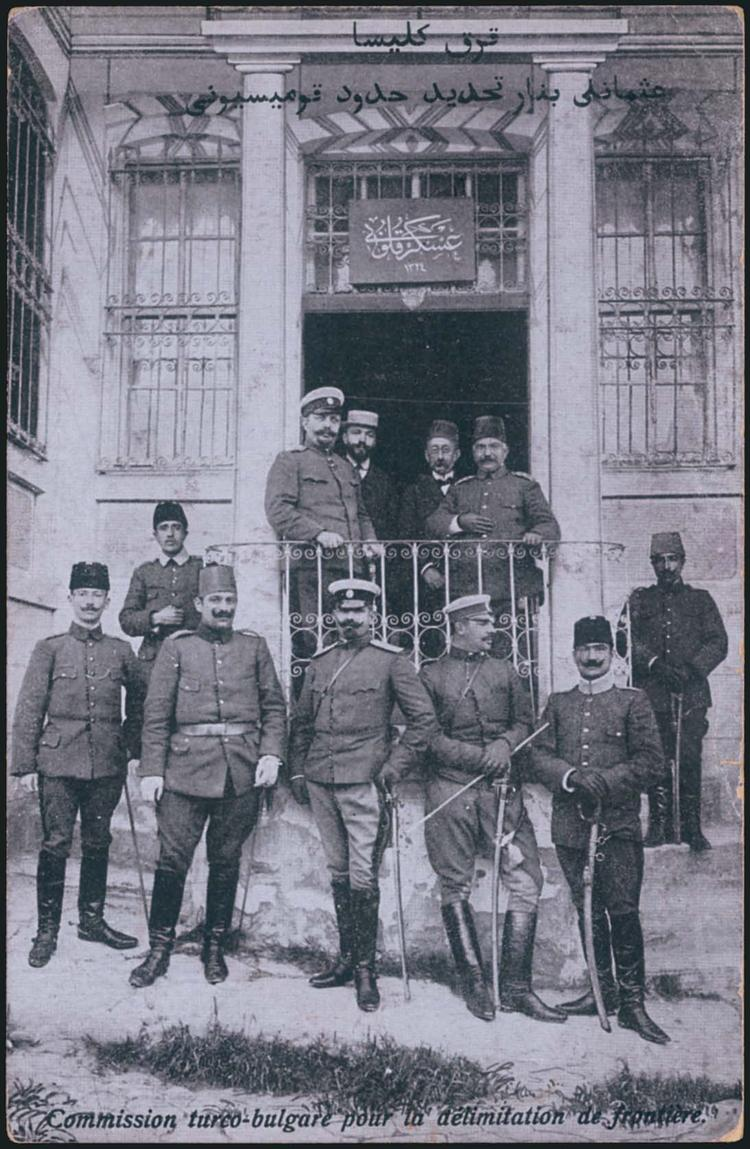 Турско-българска комисия за определяне на границата, Лозенград, 1912